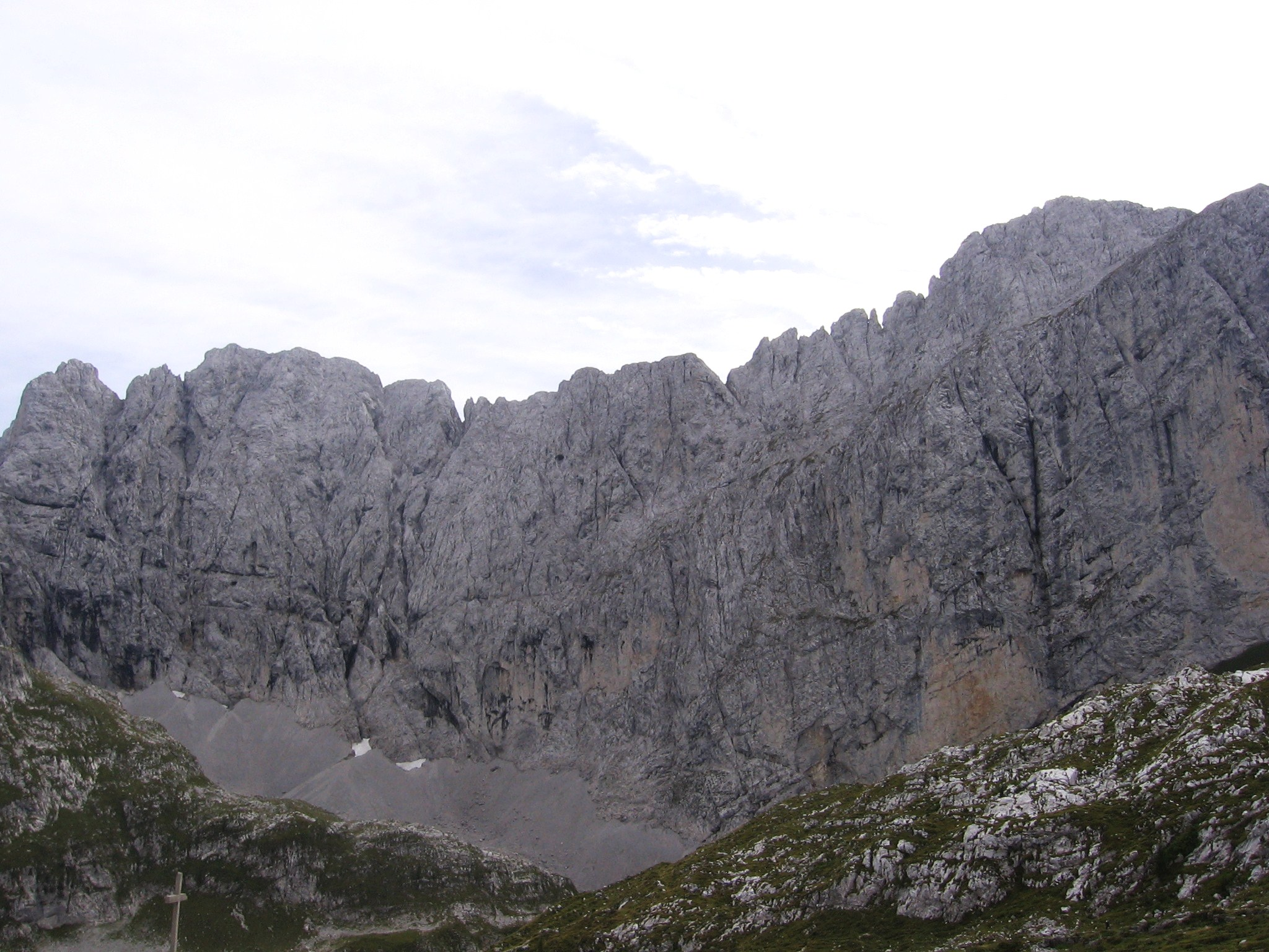 Presolana, Bergamo, Italy